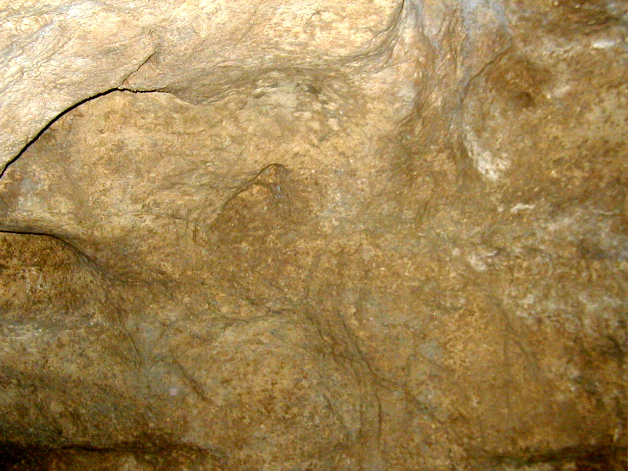 gravure rupestre (mammouth) à Pair-non-Pair (33 France)